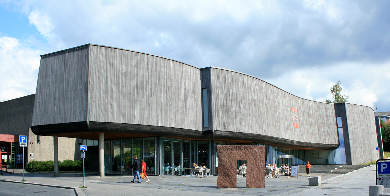 Lillehammer art museum. Lillehammer, Norway.